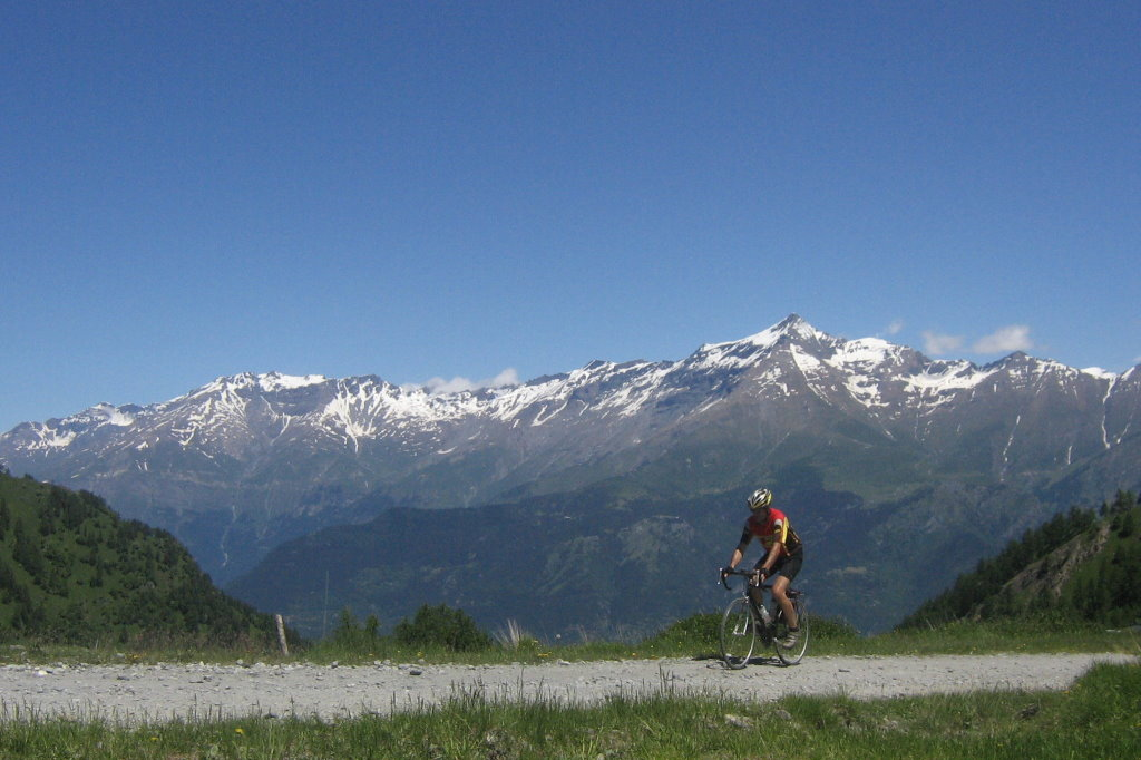 Radfahrer am Colle delle Finestre